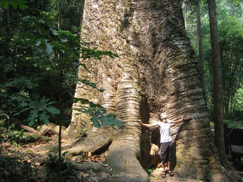 Taksin Maharat Nationalpark, Kabark-Tree, Thailand, Tak Province, größter Baum in Thailand (50 m hoch, 16 m Umfang)